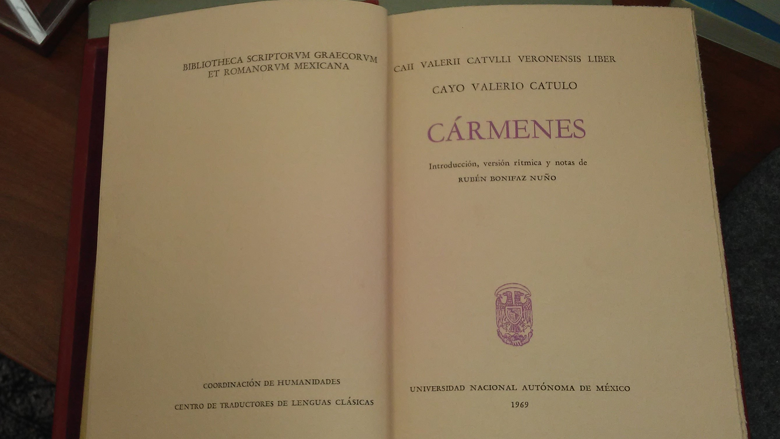 Cármenes de Cátulo traducida por Rubén Bonifaz Nuño.